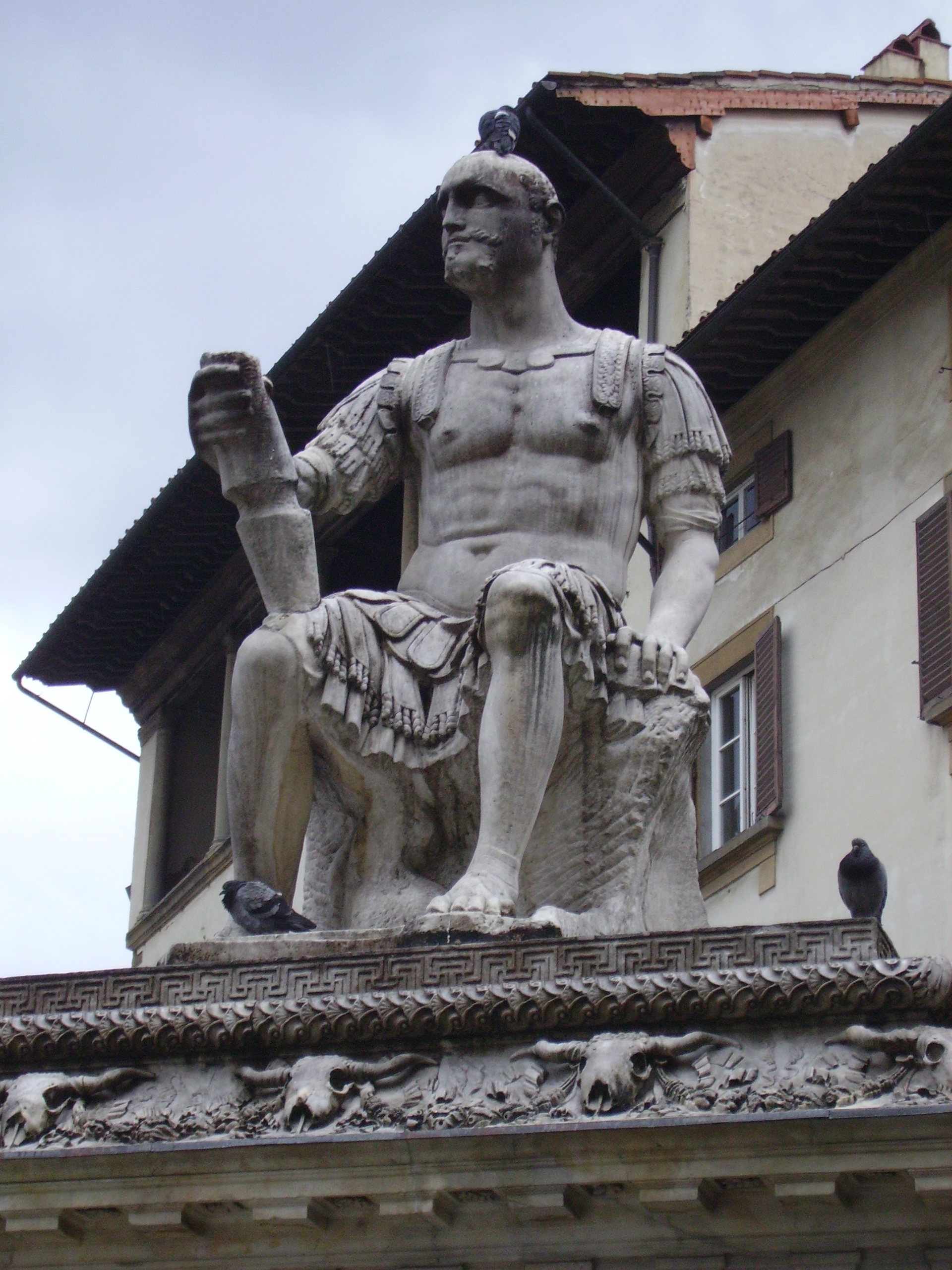 Monument to Giovanni delle Bande Nere (Florence)